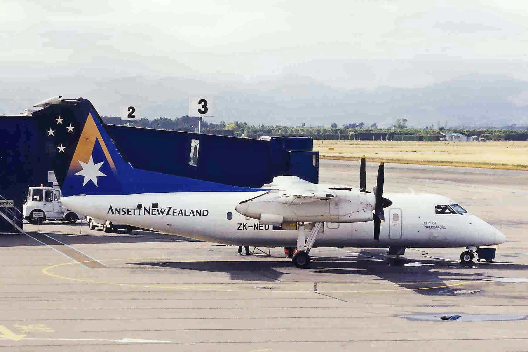 ZK-NEU DHC Dash 8-102 Ansett NZ CHC 09JAN99